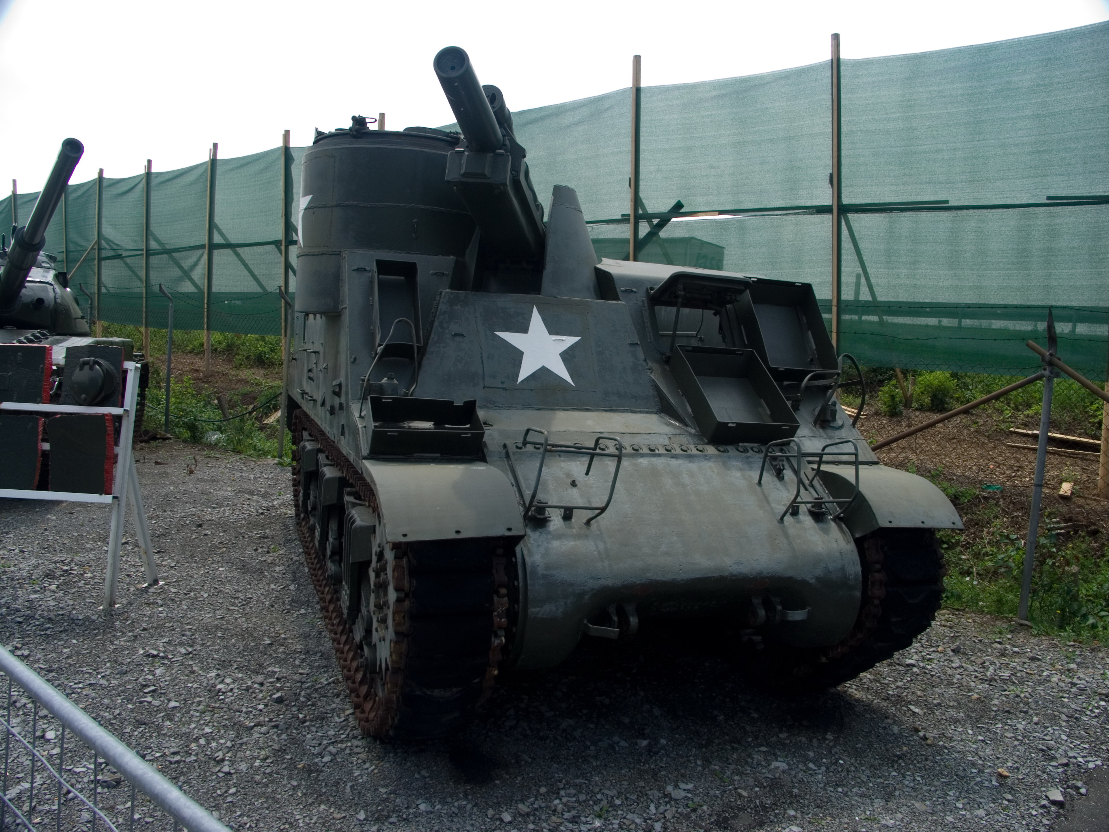 M7 Priest der US Army. Ausgestellt im Technikmuseum Sinsheim